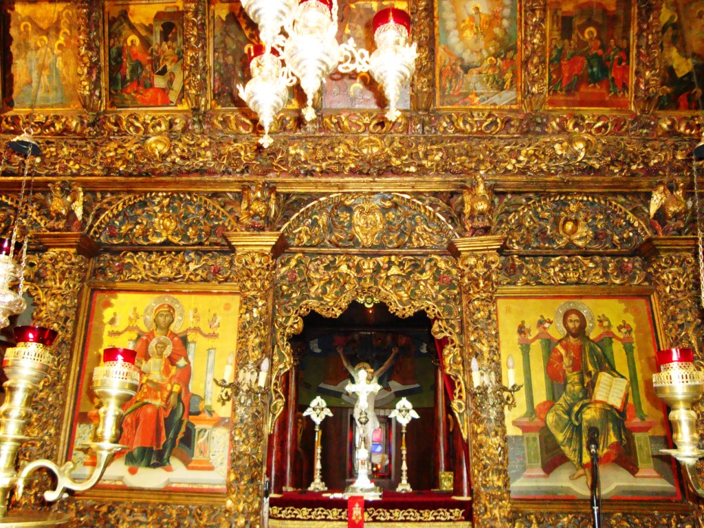 Ξυλόγλυπτο Τέμπλο Αγίου Χαραλάμπους